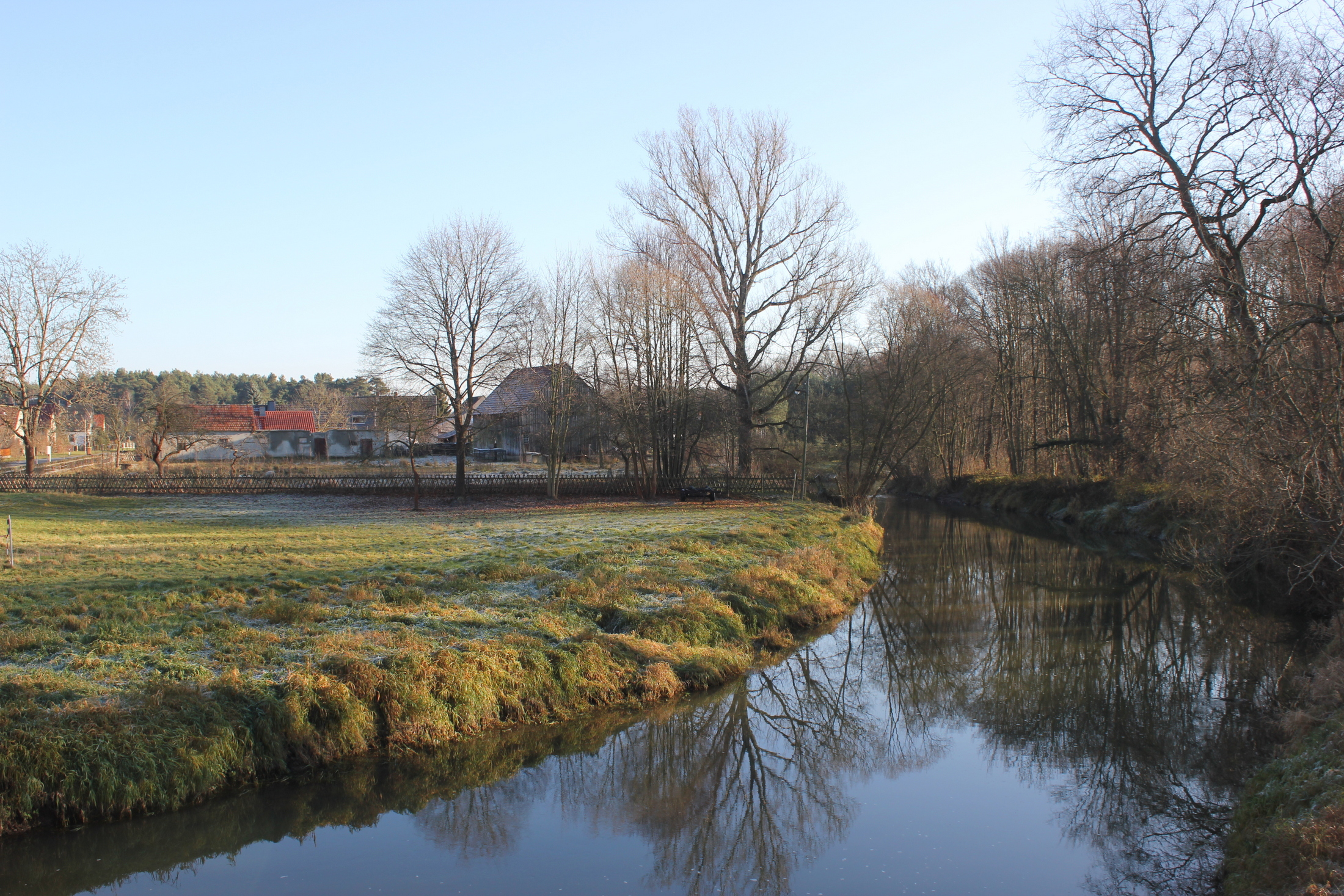 Hornjoserbsce: Sprjewja mjez Połpicu a Kislicu (gmejna Malešecy).